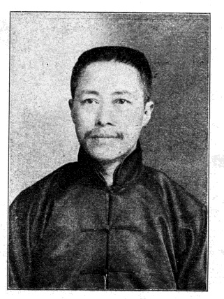 中文（台灣）: 中華民國國會議員